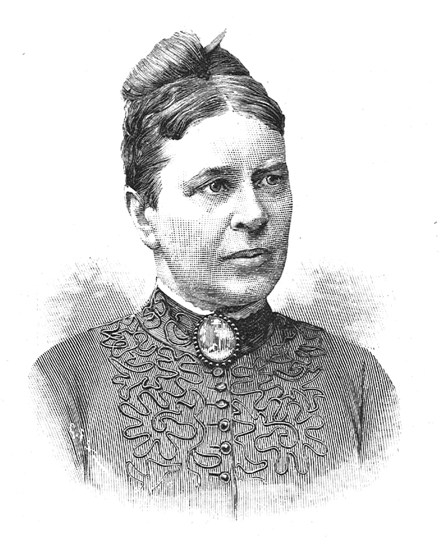 Wilma Lindhé (1839-1922)